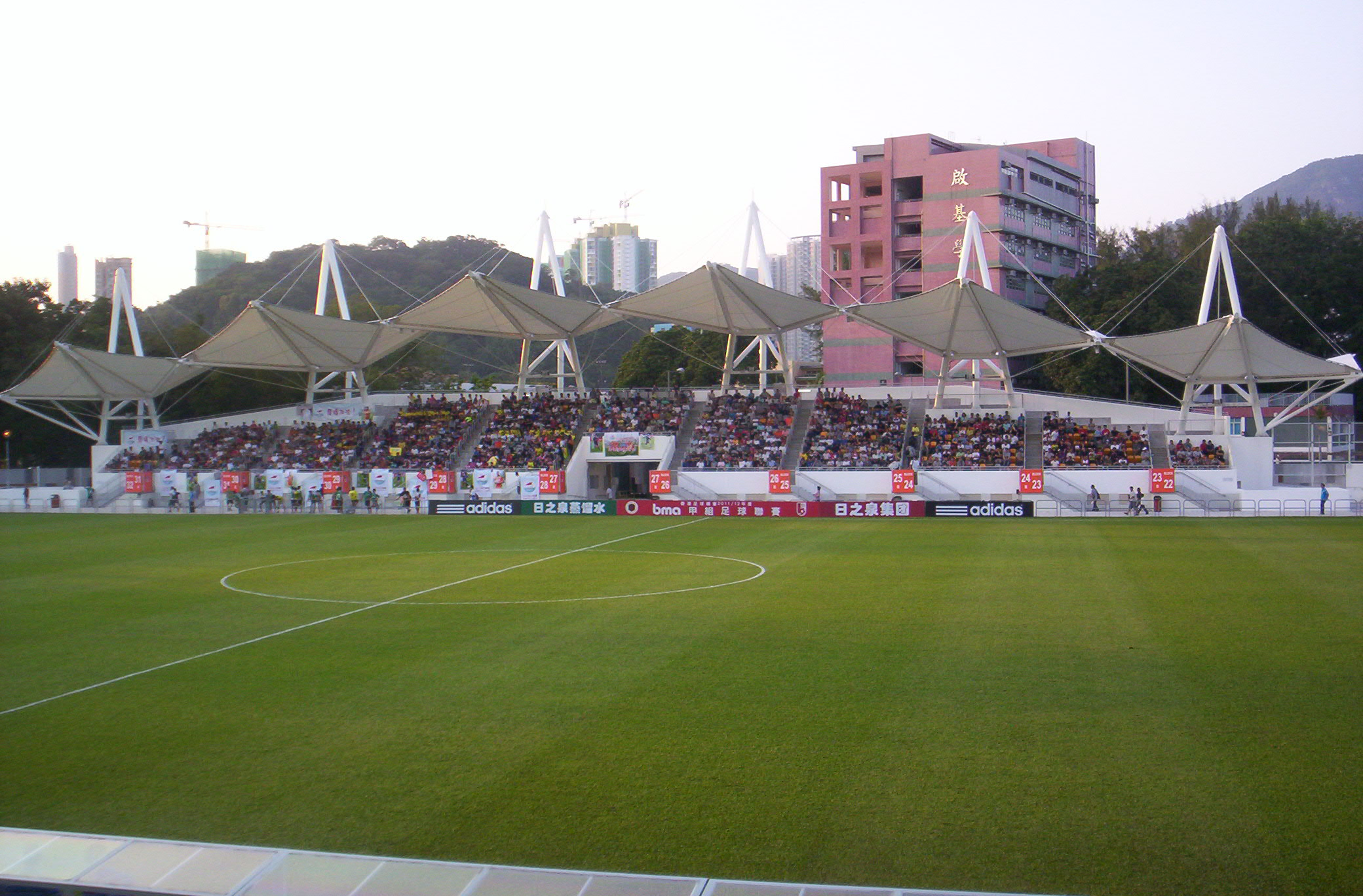 中文（香港）: 足球場中圈